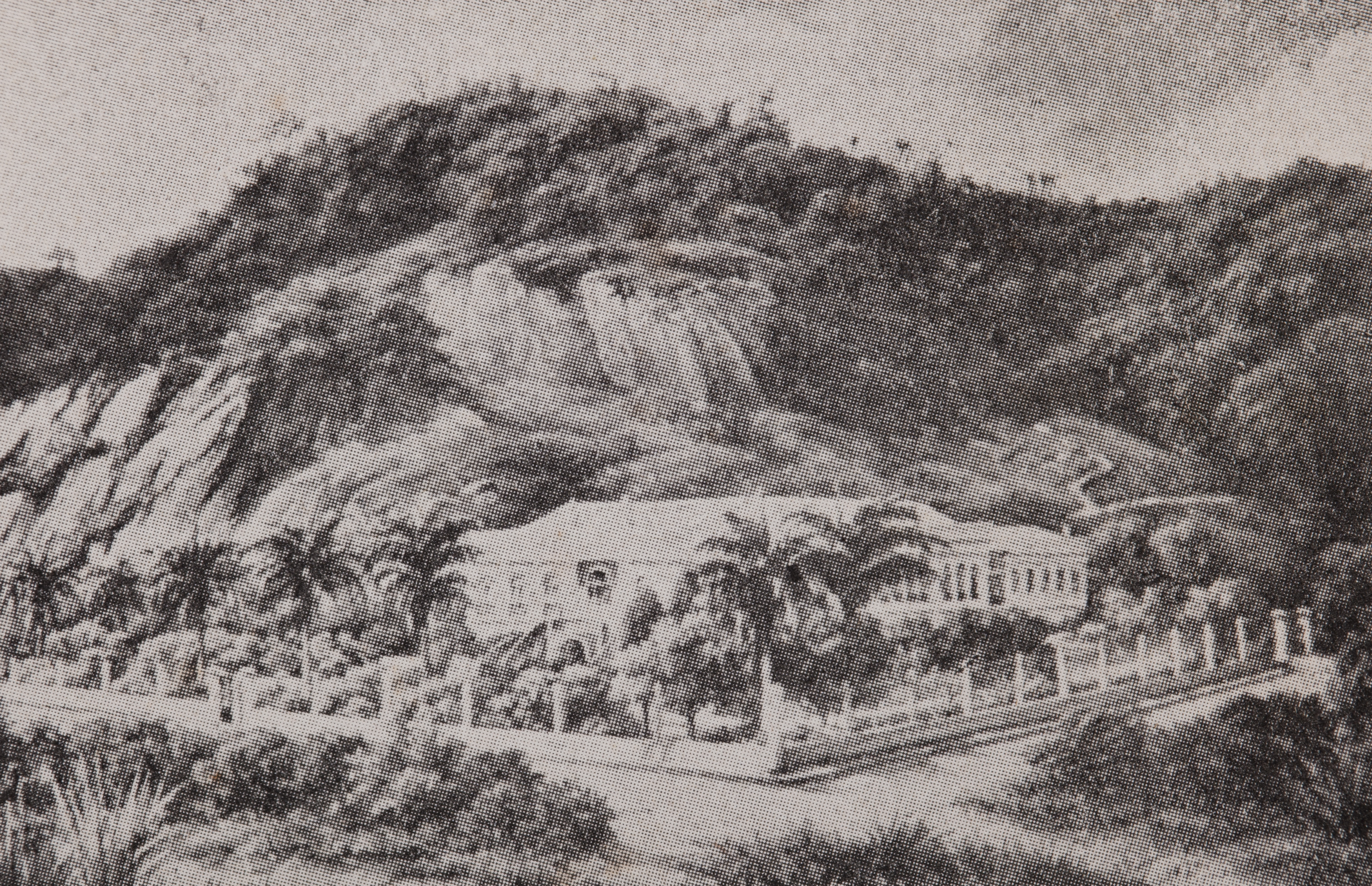 Obra que integra o acervo do Museu Paulista da USP. Coleção João Baptista de Campos Aguirra.